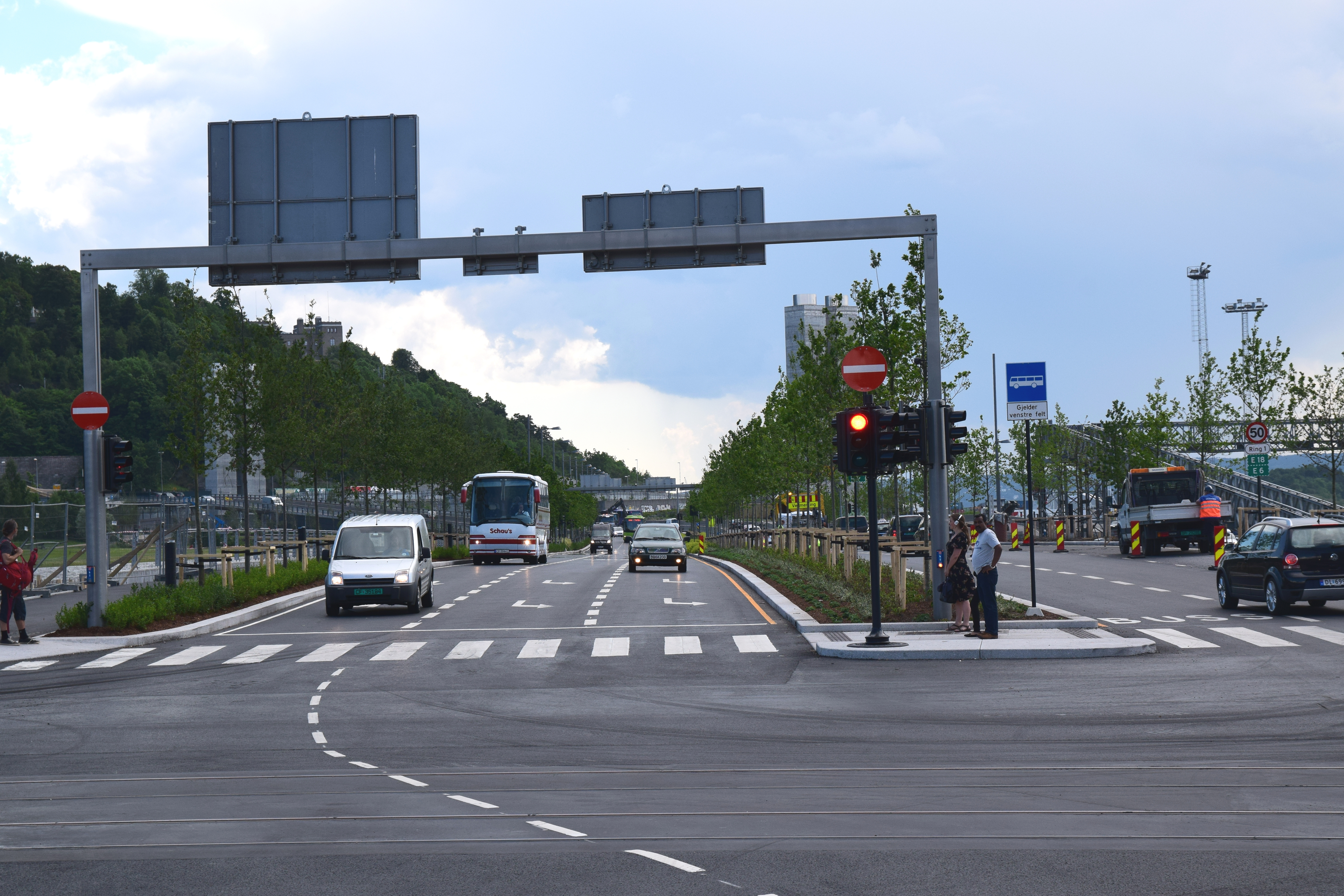 Kong Håkon 5.s gate, Bjørvika og Sørenga i Oslo, sett fra Dronning Eufemias gate